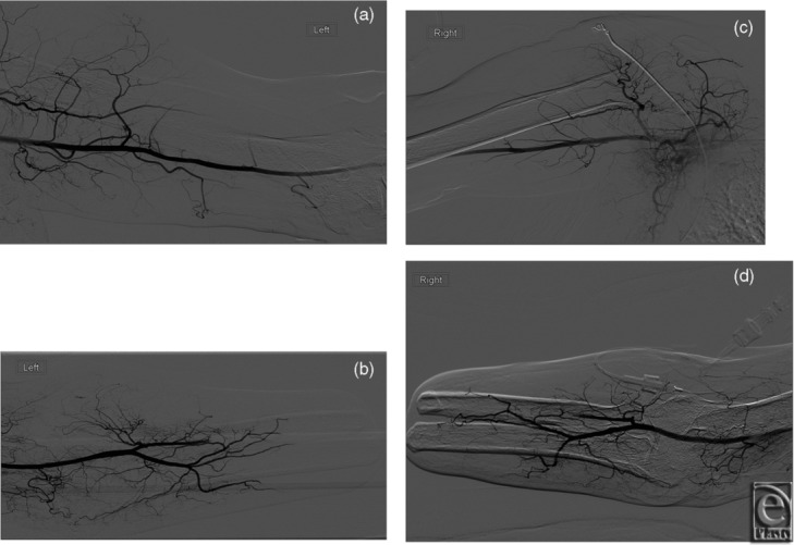 Vor einer Handtransplantation durchgeführte Angiographie der Arteria radialis, Arteria brachialis und der Arteria ulnaris im linken (a,b) und im rechten (c,d) Arm zeigt einen normalen Aufbau der Gefäße.